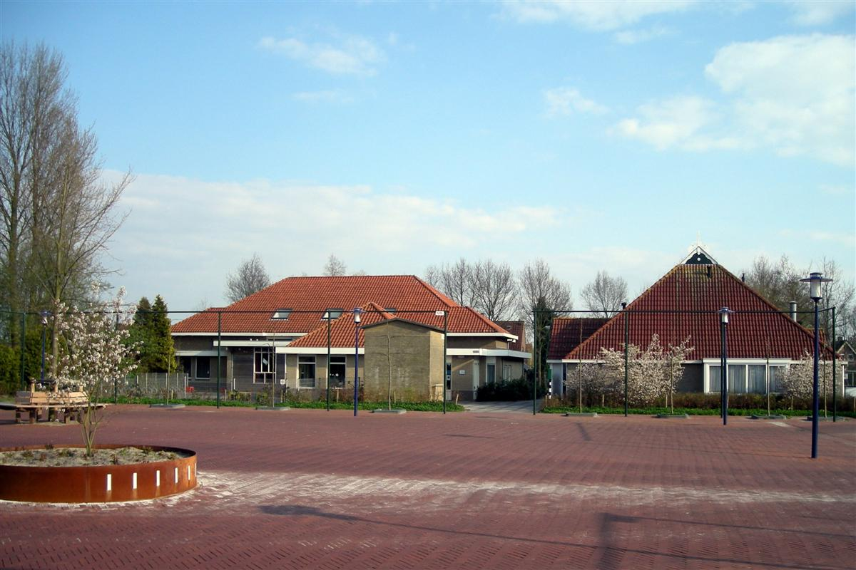 Rottum (Friesland), OBS De Ynset en Doarpshus